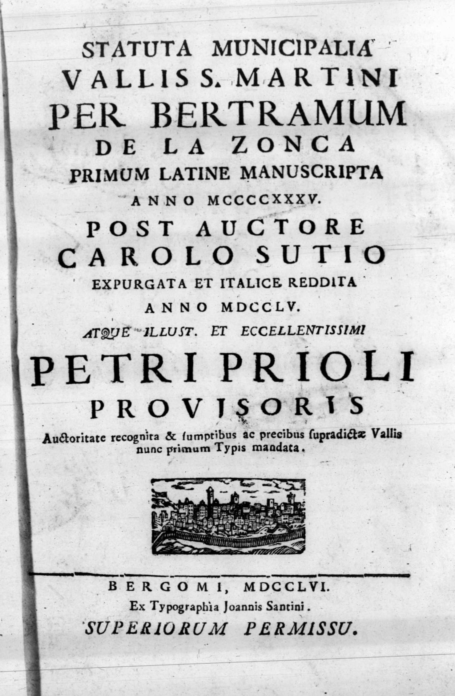 Frontespizio